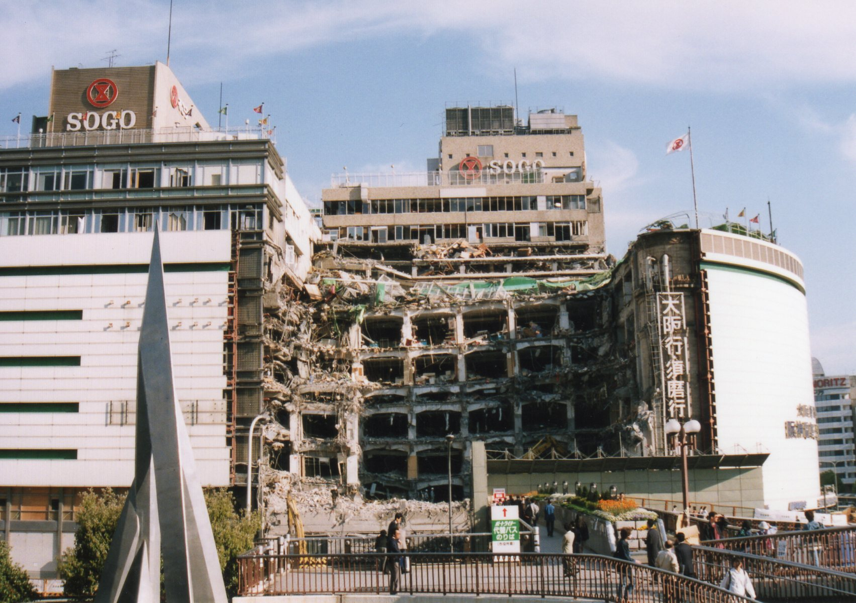 そごう神戸店（1995年、被災箇所解体中）